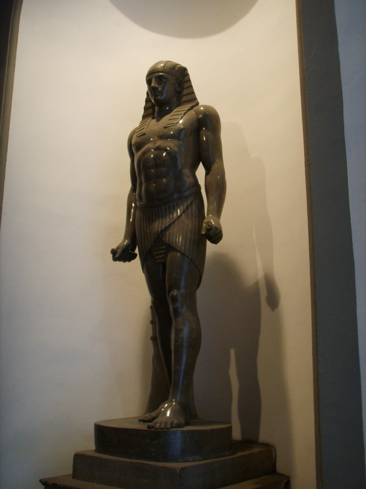 Palazzo borghese, androne, statua egizia